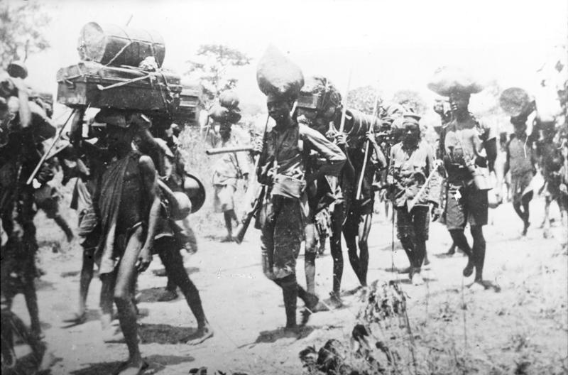 Schutztruppe Deutsch-Ost-Afrika, Träger Schutztruppe Deutsch-Ost-Afrika Träger auf dem Marsch